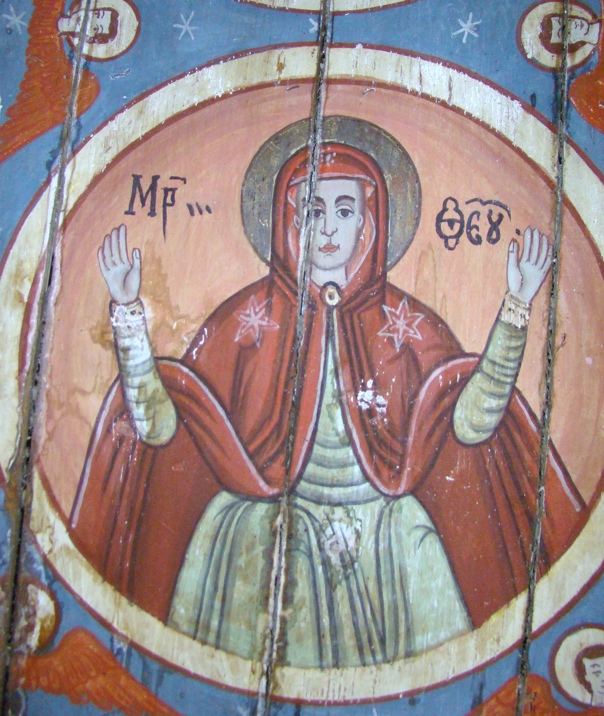 Edicul „Osuar” cu pictură pe pânză